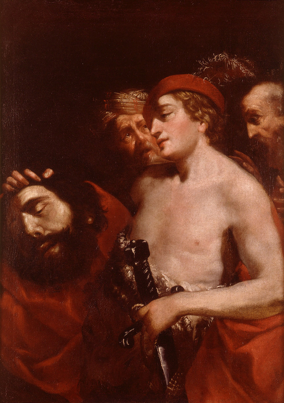 La obra representa al joven David, que llegaría a reinar en Israel después de la muerte de Saúl, contemplando la cabeza del gigante filisteo Goliat, a quien David había dado muerte y posteriormente decapitado.